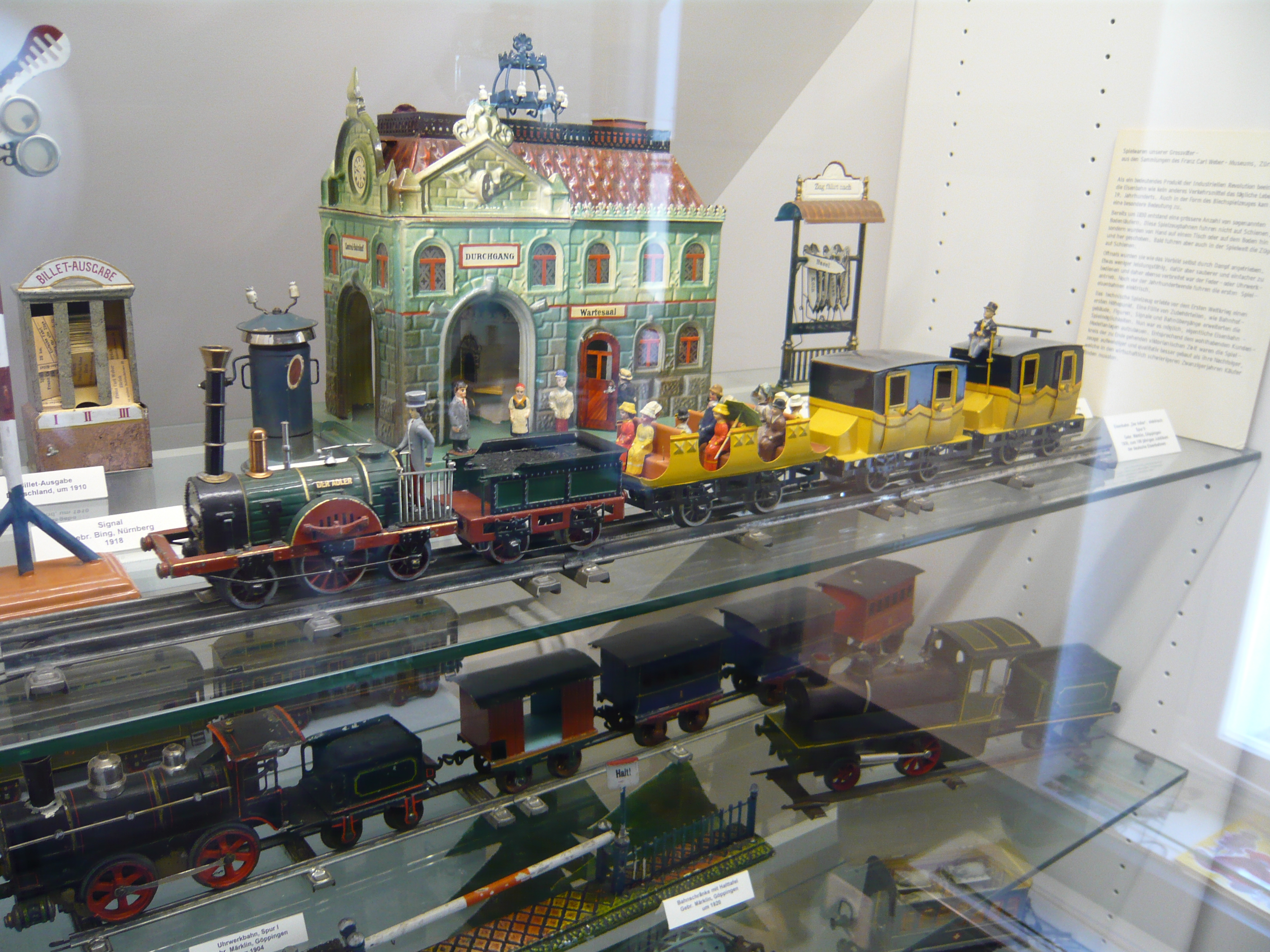 aufgenommen im Zürcher SpielzeugmuseumNative nameZürcher SpielzeugmuseumLocationZürich, SwitzerlandCoordinates47° 22′ 23.15″ N, 8° 32′ 23.22″ EEstablished1956WebsiteZürcher Spielzeugmuseum